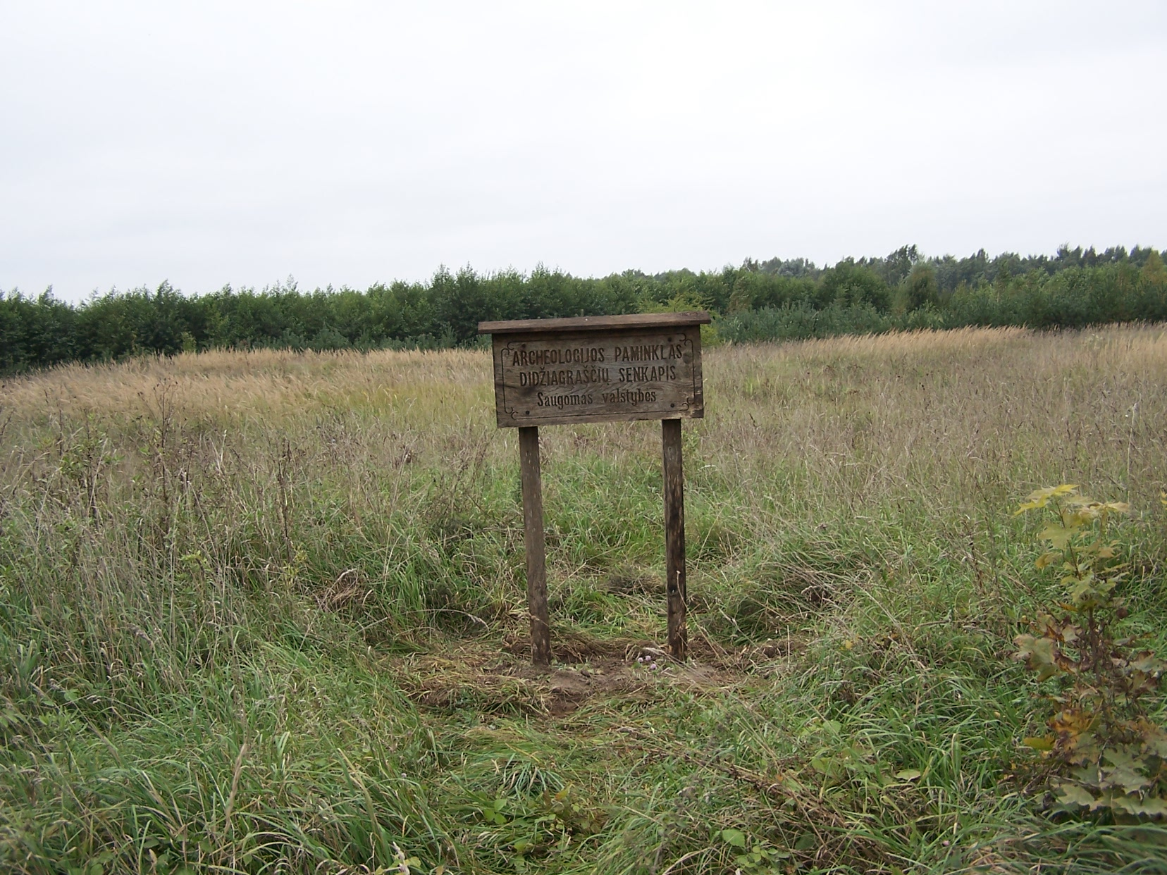 Didžiagrašių kapinynas